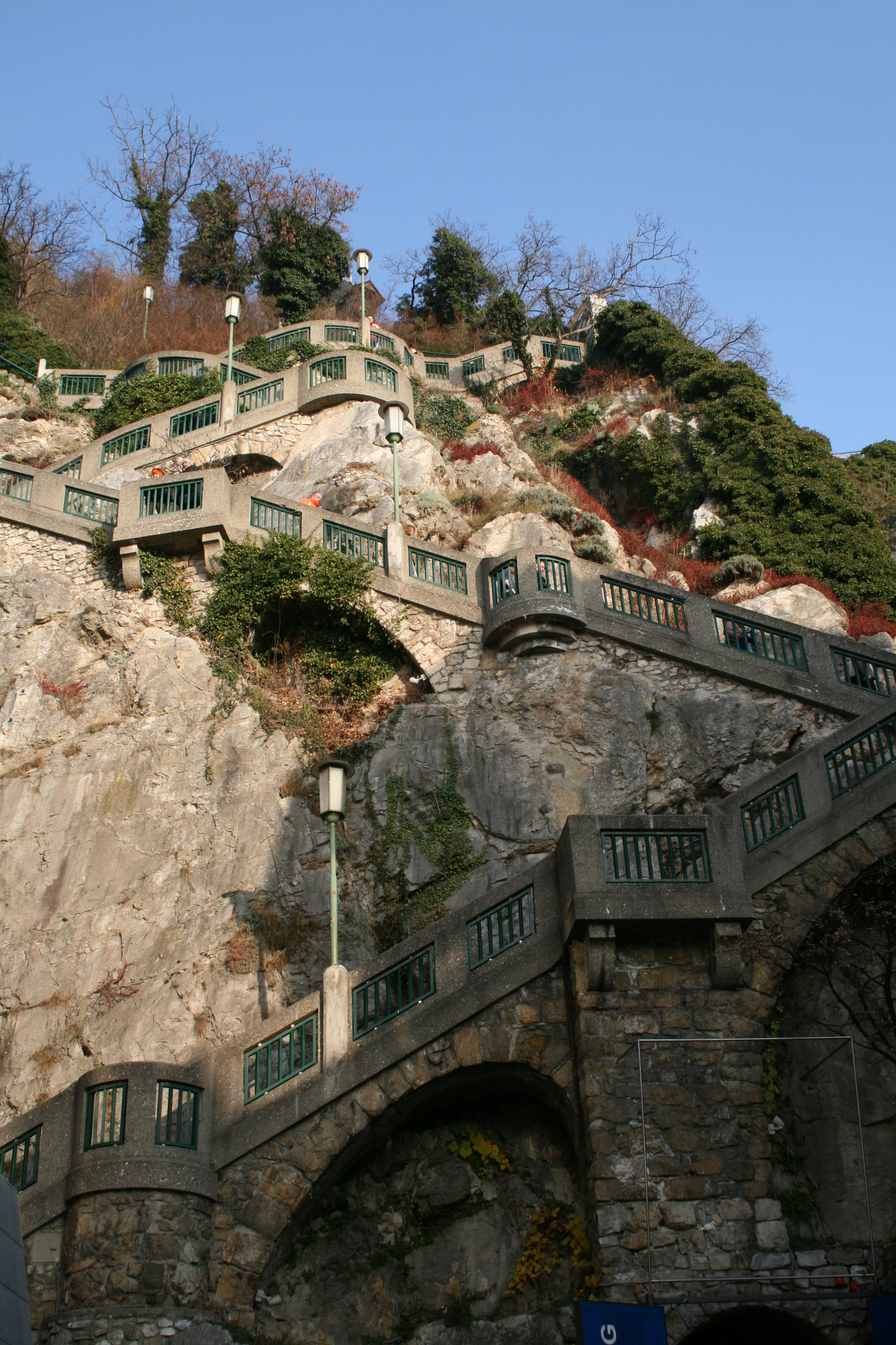 Graz, Austria: Schlossbergstiege